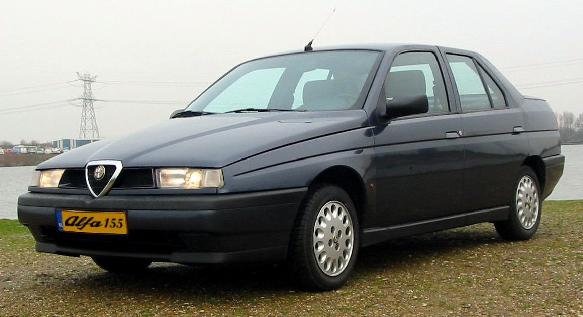 Alfa Romeo 155 Widebody